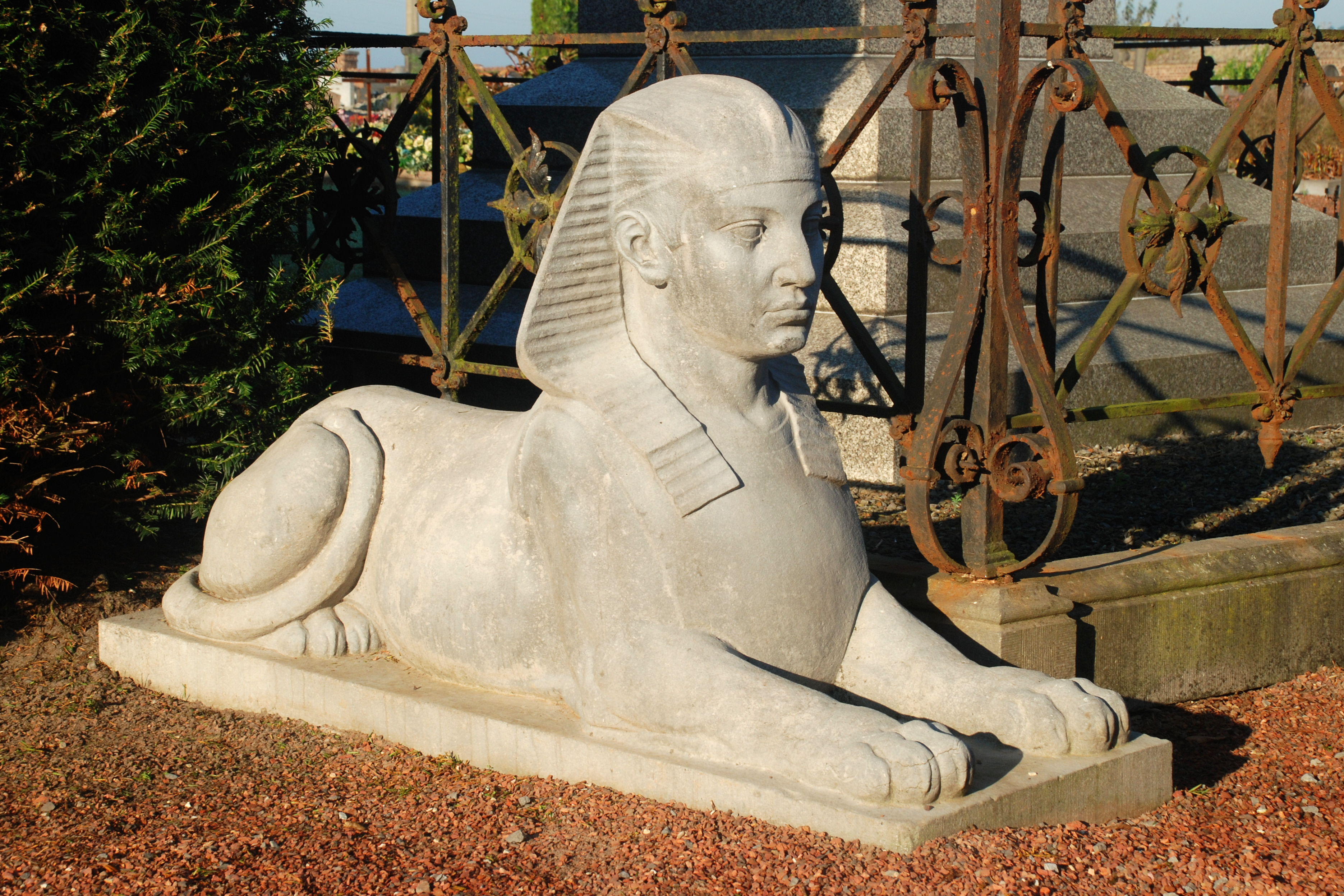 Belgique - Brabant wallon - Court-Saint-Etienne - Mausolée Goblet d'Alviella